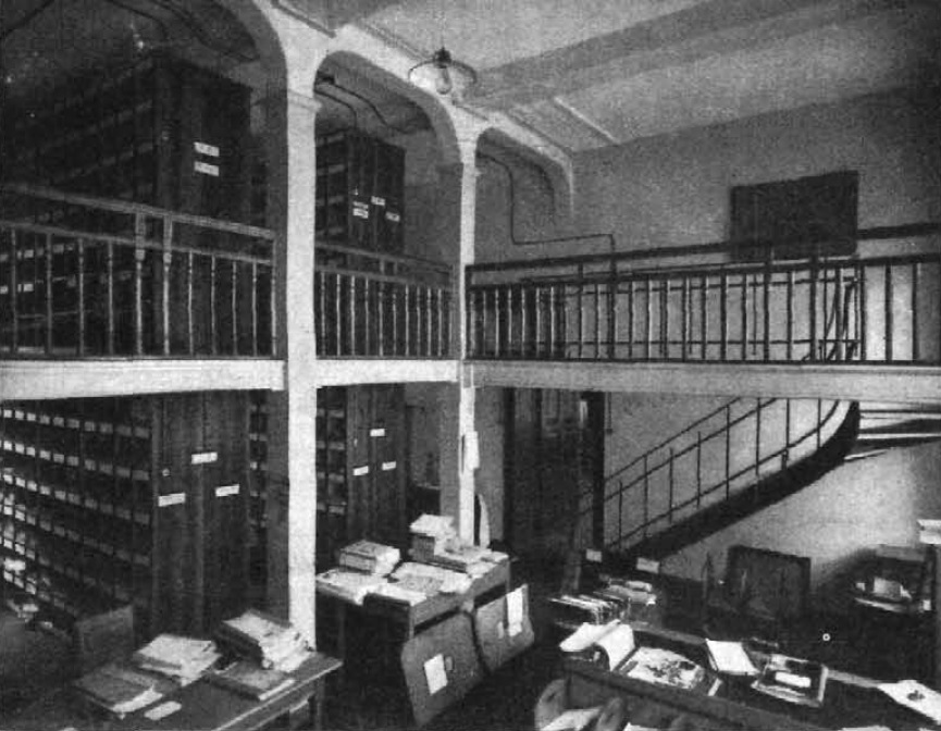 Regierungsgebäude Frankfurt (Oder) 1906 Aktenraum mit den Arbeitsplätzen für Registratoren